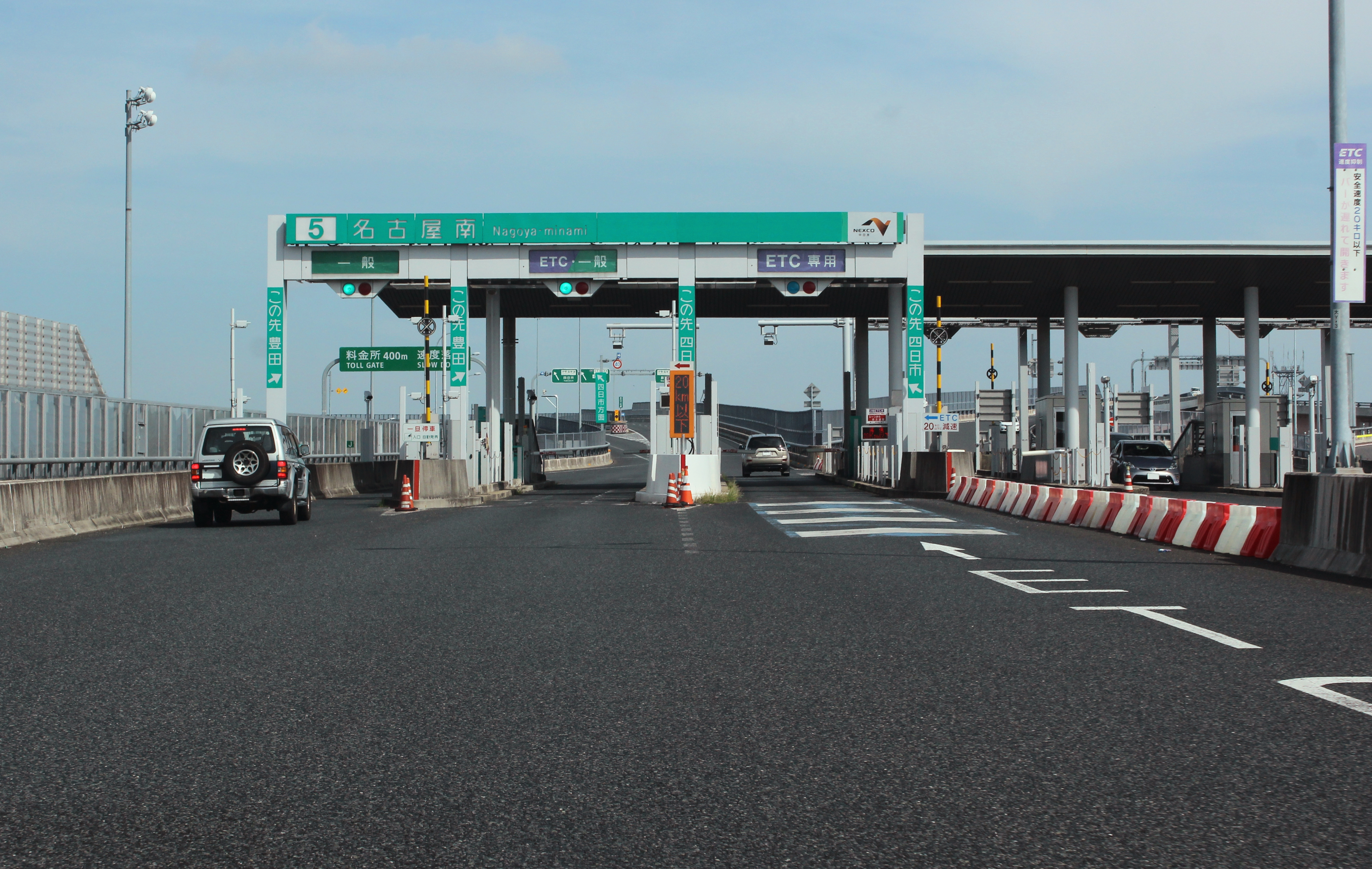 名古屋南ジャンクション料金所（名古屋高速→伊勢湾岸）